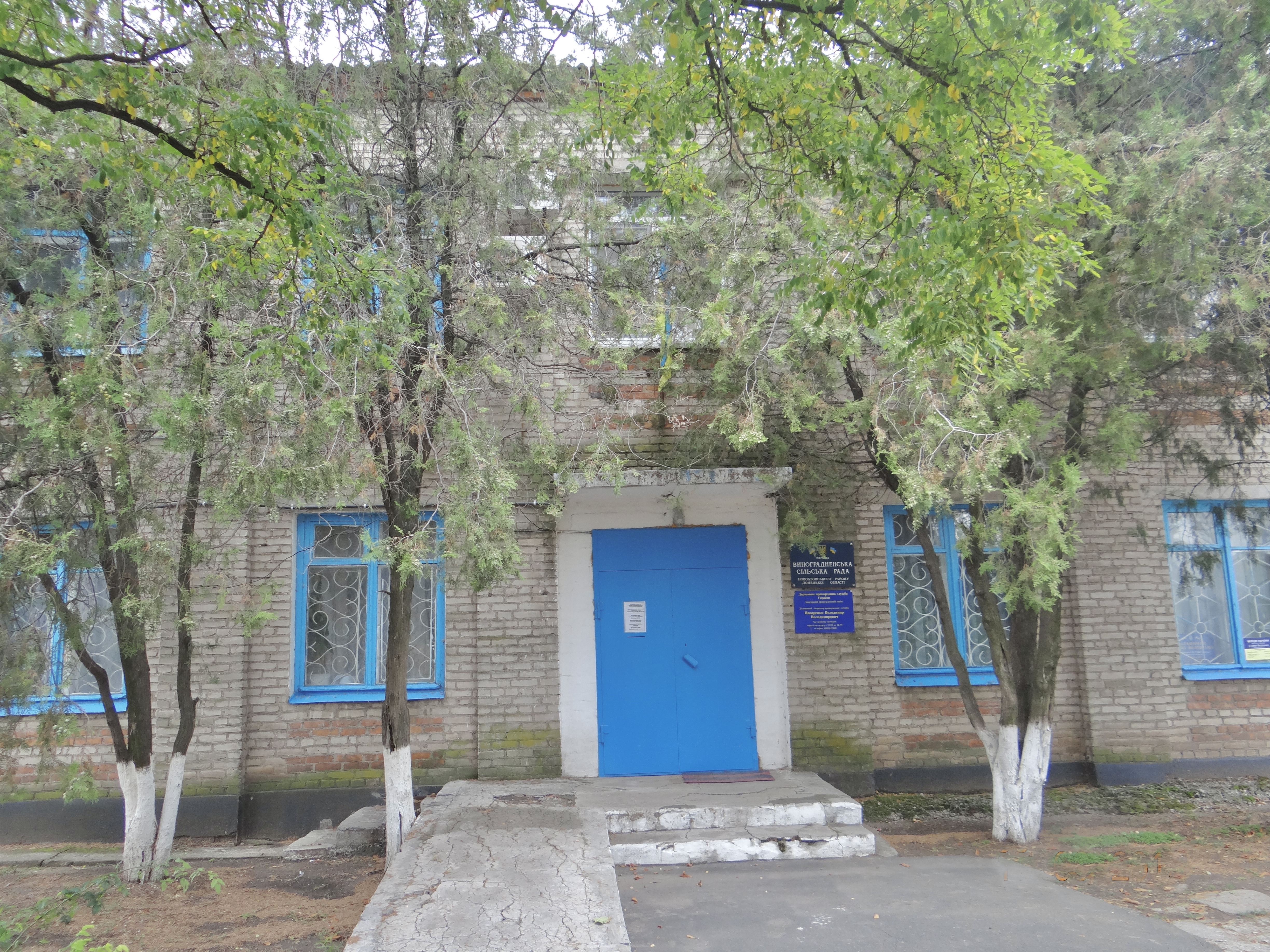 Виноградненська сільрада